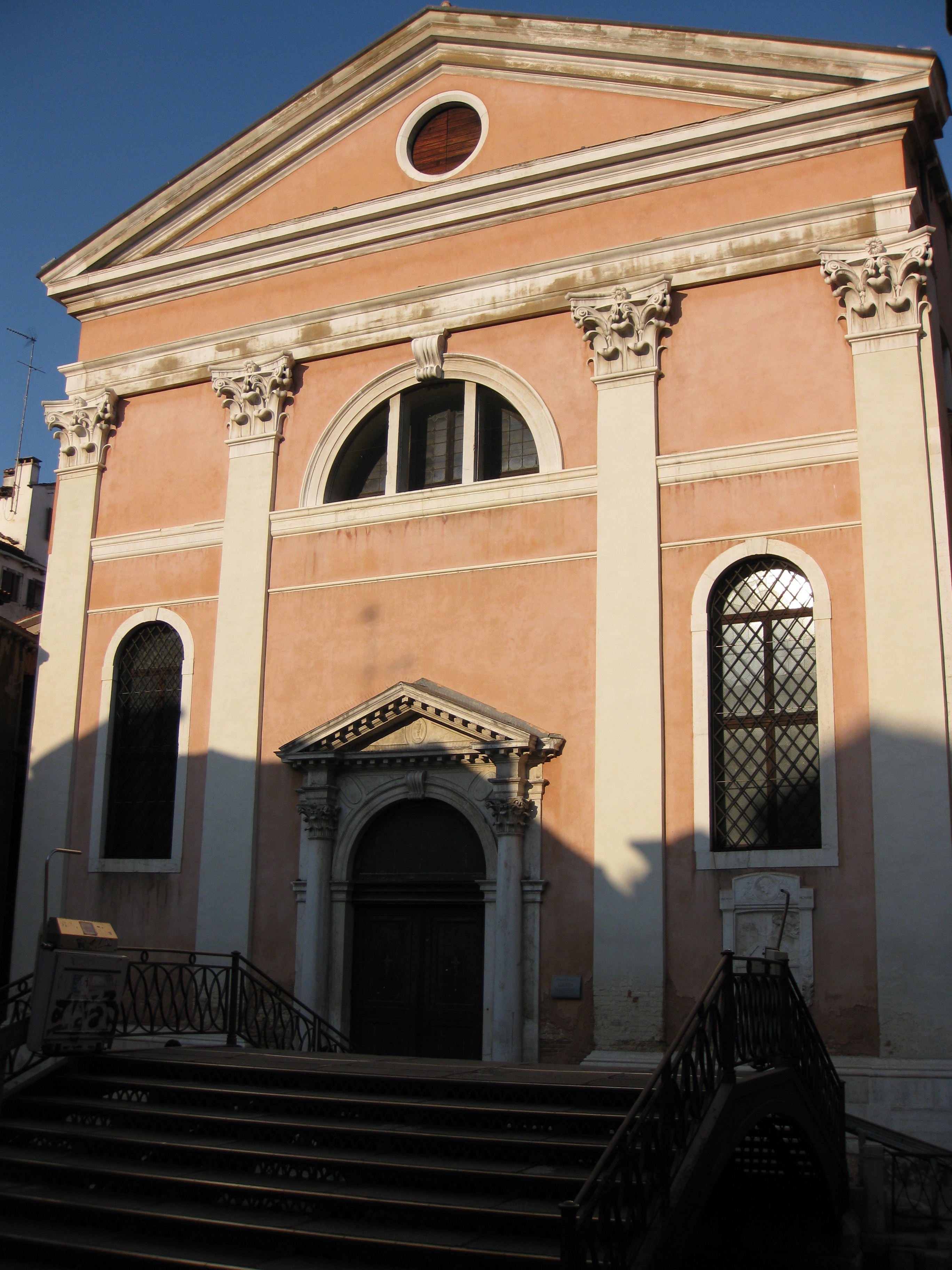 Chiesa di San Luca a Venezia.